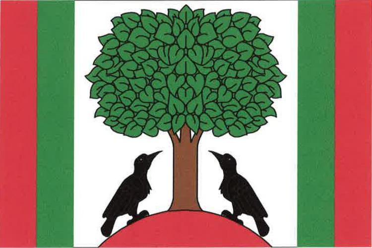 Libštát vlajka